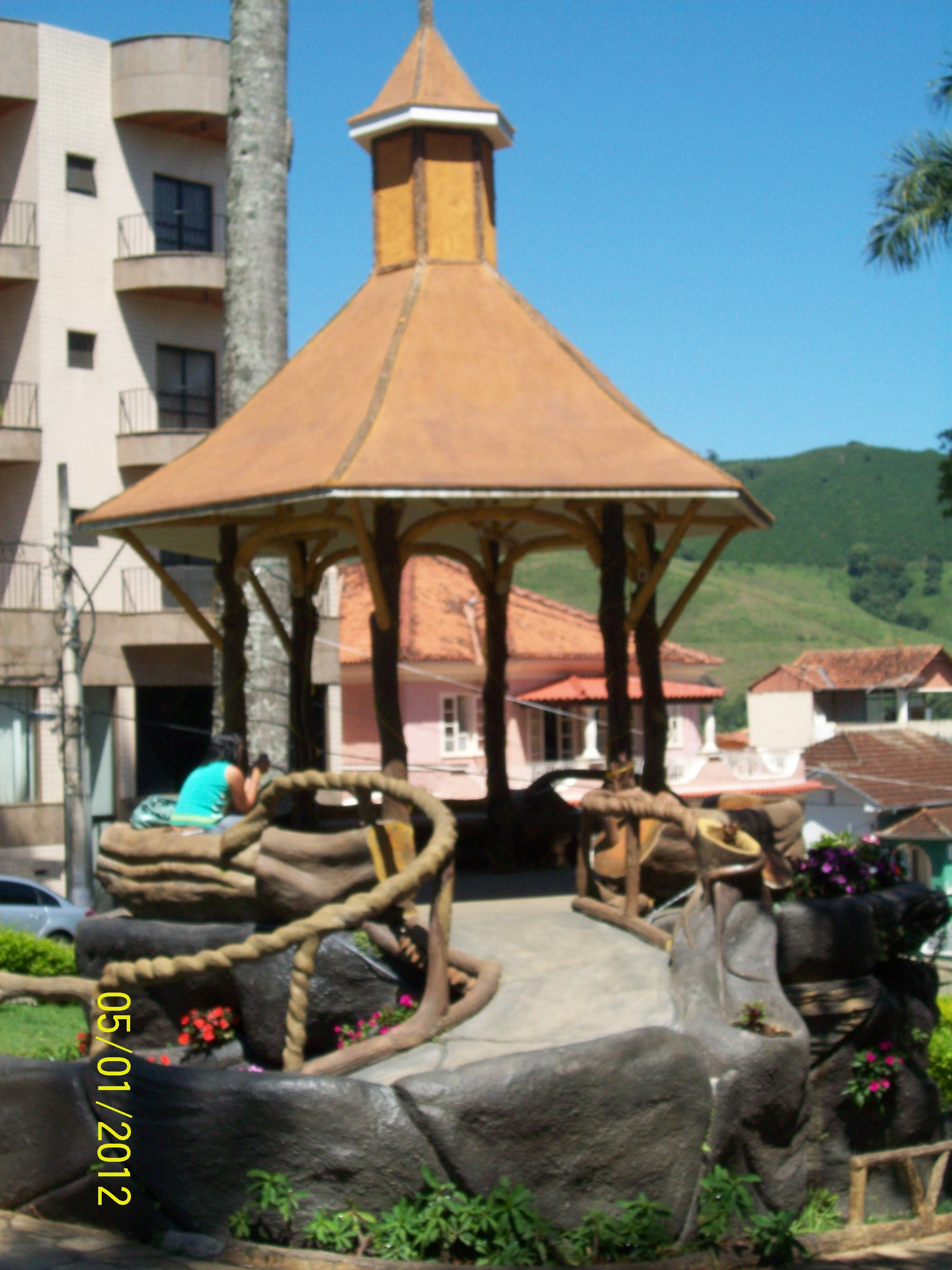 Carmo de Minas - Coreto da Praça Principal